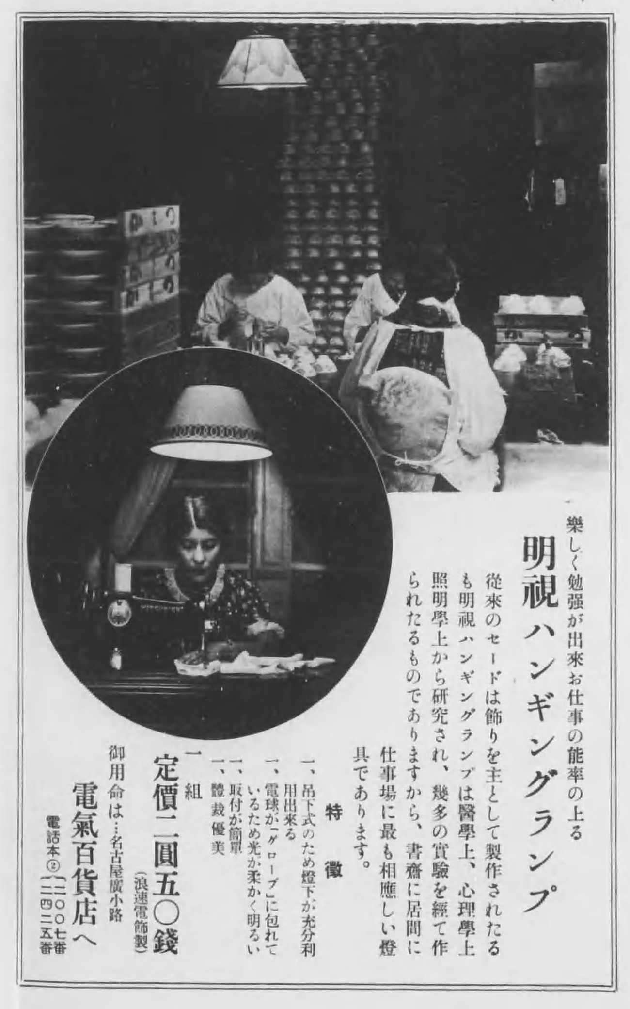 1938年発行『名古屋商工案内』に掲載された東邦電力の広告。ハンギングランプを宣伝する内容。広告中の「電気百貨店」は名古屋広小路沿いにあった東邦電力の施設。